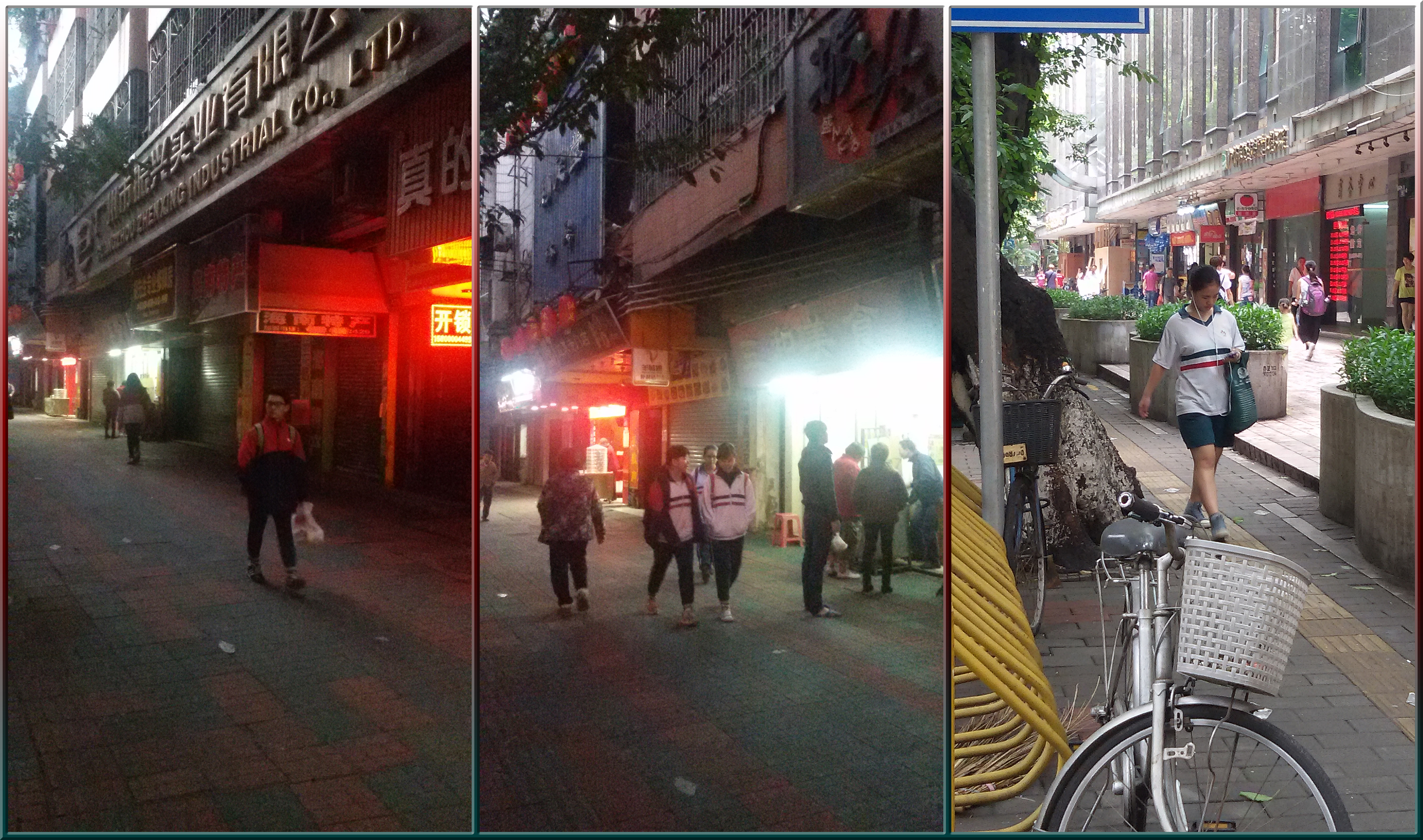 粵語: 广州市南海中学嘅校服